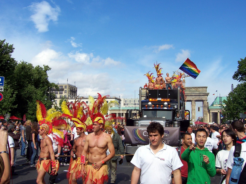 CSD Berlin 2007 - Partytruck 1